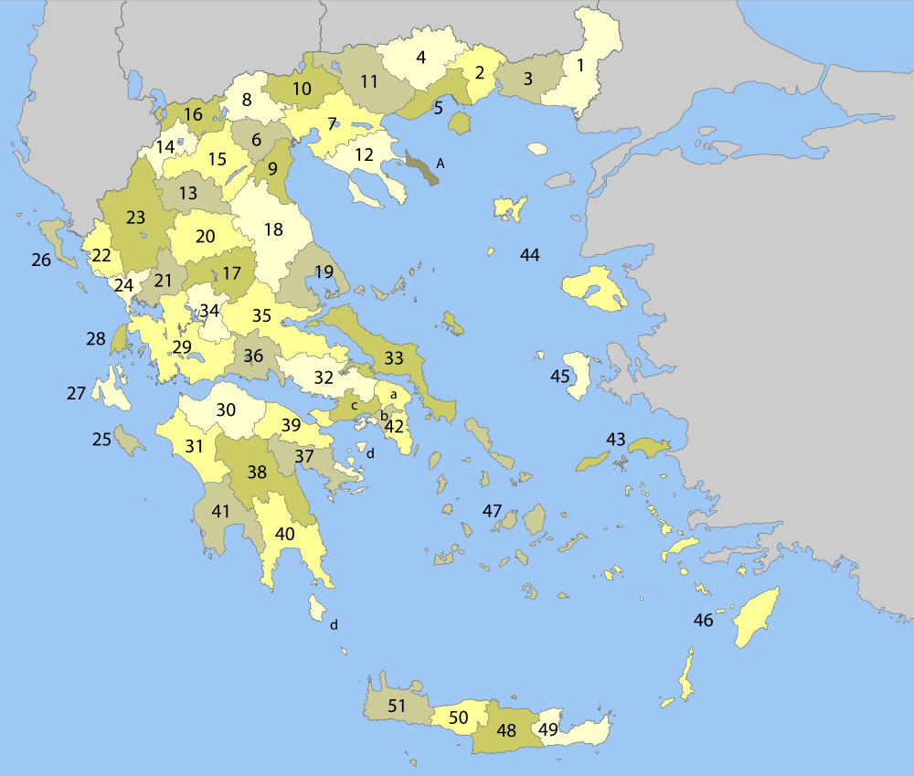 Greece prefectures numbered 1. Evros (Νομός Έβρου) 2. Xanthi (Νομός Ξάνθης) 3. Rodopi (Νομός Ροδόπης) 4. Drama (Νομός Δράμας) 5. Kavala (Νομός Καβάλας) 6. Imathia (Νομός Ημαθίας) 7. Thessaloniki (Νομός Θεσσαλονίκης) 8. Kilkis (Νομός Κιλκίς) 9. Pella (Νομός Πέλλας) 10. Pieria (Νομός Πιερίας) 11. Serres (Νομός Σερρών) 12. Chalkidiki (Νομός Χαλκιδικής) 13. Grevena (Νομός Γρεβενών) 14. Kastoria (Νομός Καστοριάς) 15. Kozani (Νομός Κοζάνης) 16. Florina (Νομός Φλώρινας) 17. Karditsa (Νομός Καρδίτσας) 18. Larisa (Νομός Λάρισας) 19. Magnisia (Νομός Μαγνησίας) 20. Trikala (Νομός Τρικάλων) 21. Arta (Νομός Άρτας) 22. Thesprotia (Νομός Θεσπρωτίας) 23. Ioannina (Νομός Ιωαννίνων) 24. Preveza (Νομός Πρέβεζας) 25. Zakynthos (Νομός Ζακύνθου) 26. Corfu/Kerkyra (Νομός Κέρκυρας) 27. Kefallinia (Νομός Κεφαλληνίας) 28. Lefkada (Νομός Λευκάδας) 29. Etoloakarnania (Νομός Αιτωλοακαρνανίας) 30. Achaia (Νομός Αχαΐας) 31. Elis/Ilia (Νομός )Ηλείας 32. Boeotia/Viotia (Νομός Βοιωτίας) 33. Euboea/Evvia (Νομός Εύβοιας) 34. Evrytania (Νομός Ευρυτανίας) 35. Fthiotida (Νομός Φθιώτιδας) 36. Fokida (Νομός Φωκίδας) 37. Argolis (Νομός Αργολίδας) 38. Arcadia (Νομός Αρκαδίας) 39. Korinthia (Νομός Κορινθίας) 40. Lakonia (Νομός Λακωνίας) 41. Messinia (Νομός Μεσσηνίας) 42. Attica (Νομός Αττικής) a. East Attica (Νομαρχία Ανατολικής Αττικής) b. Athens (Νομαρχία Αθηνών) c. West Attica (Νομαρχία Δυτικής Αττικής) d. Piraeus (Νομαρχία Πειραιά) 43. Lesvos (Νομός Λέσβου) 44. Samos (Νομός Σάμου) 45. Chios (Νομός Χίου) 46. Dodecanese (Νομός Δωδεκανήσου) 47. Cyclades (Νομός Κυκλάδων) 48. Iraklio (Νομός Ηρακλείου) 49. Lasithi (Νομός Λασιθίου) 50. Rethymno (Νομός Ρεθύμνου) 51. Chania (Νομός Χανίων) A. Athos (Άγιο Όρος)